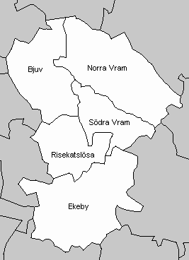 Socken in Bjuv